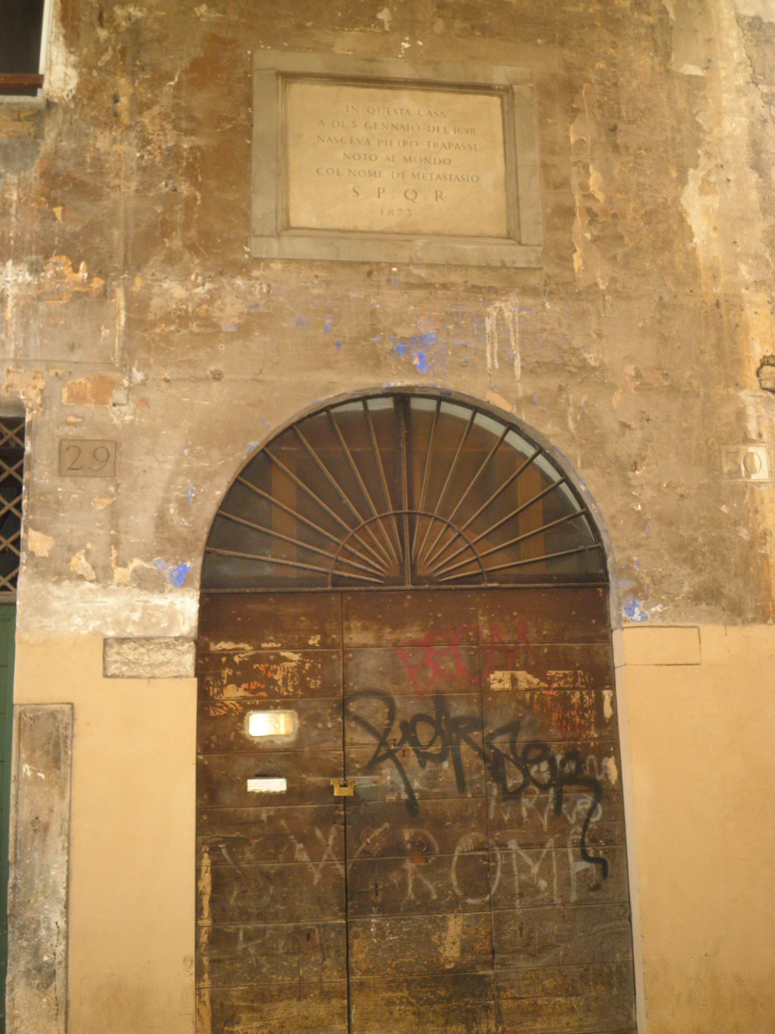 Roma, memoria di Pietro Metastasio sulla sua casa di nascita a via dei Cappellari (1873)